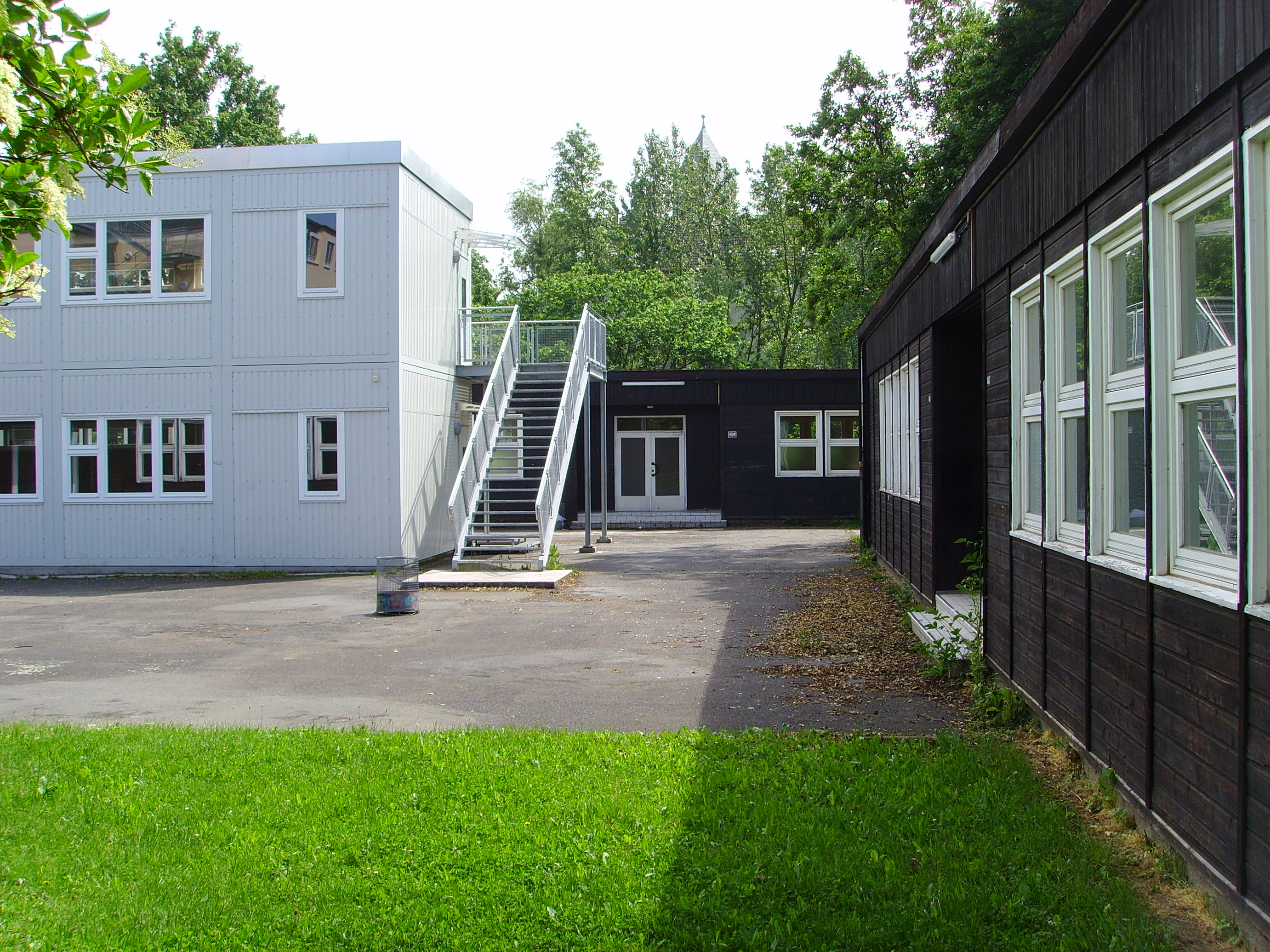 Ziehenschule in Frankfurt am Main, Barackenhof mit alten und neuen Notunterkünften